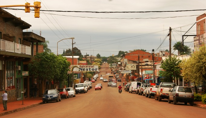 Una de las entradas a la ciudad de Jardín América, Misiones, Argentina.